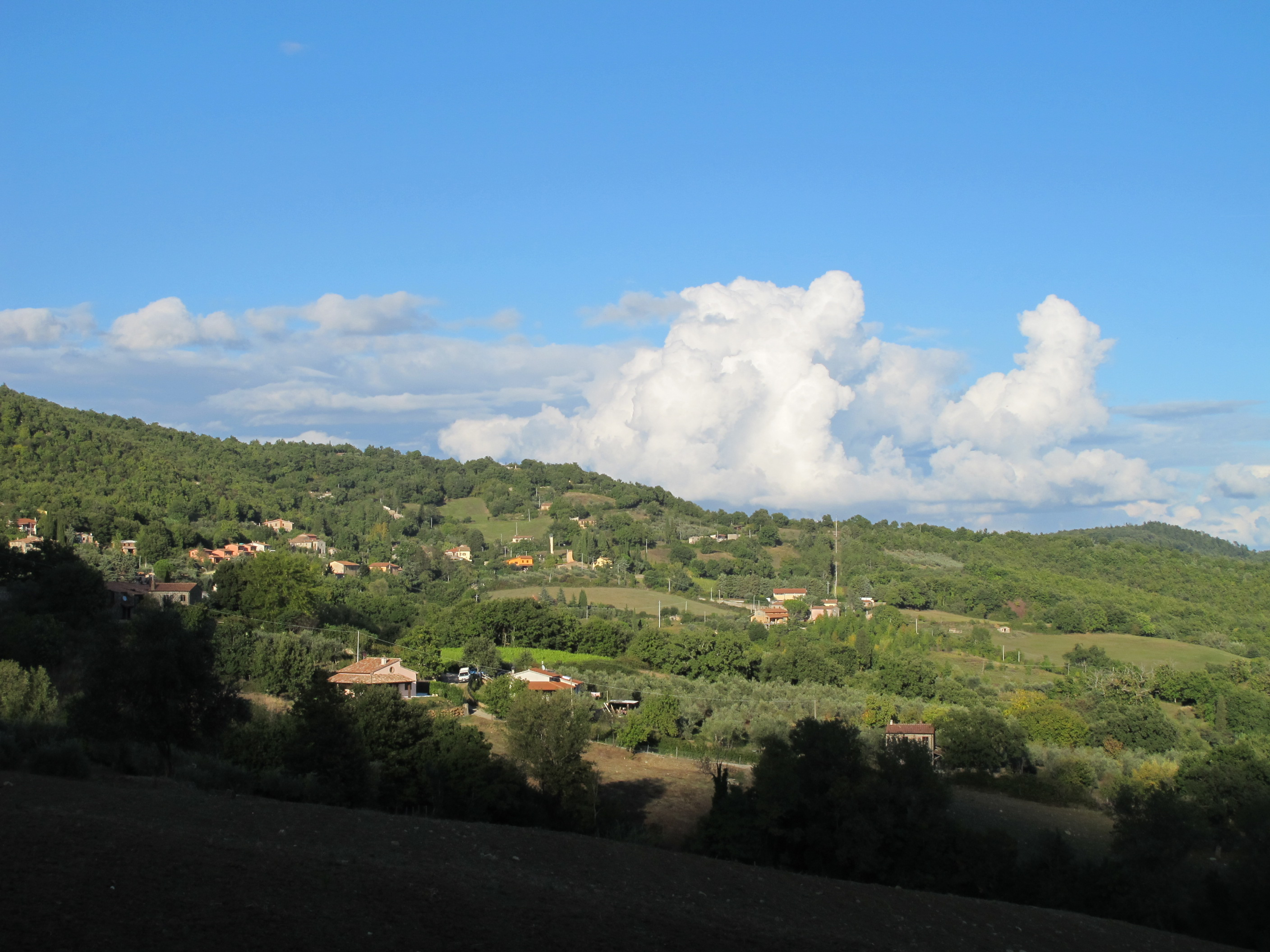 Blick auf Elmo